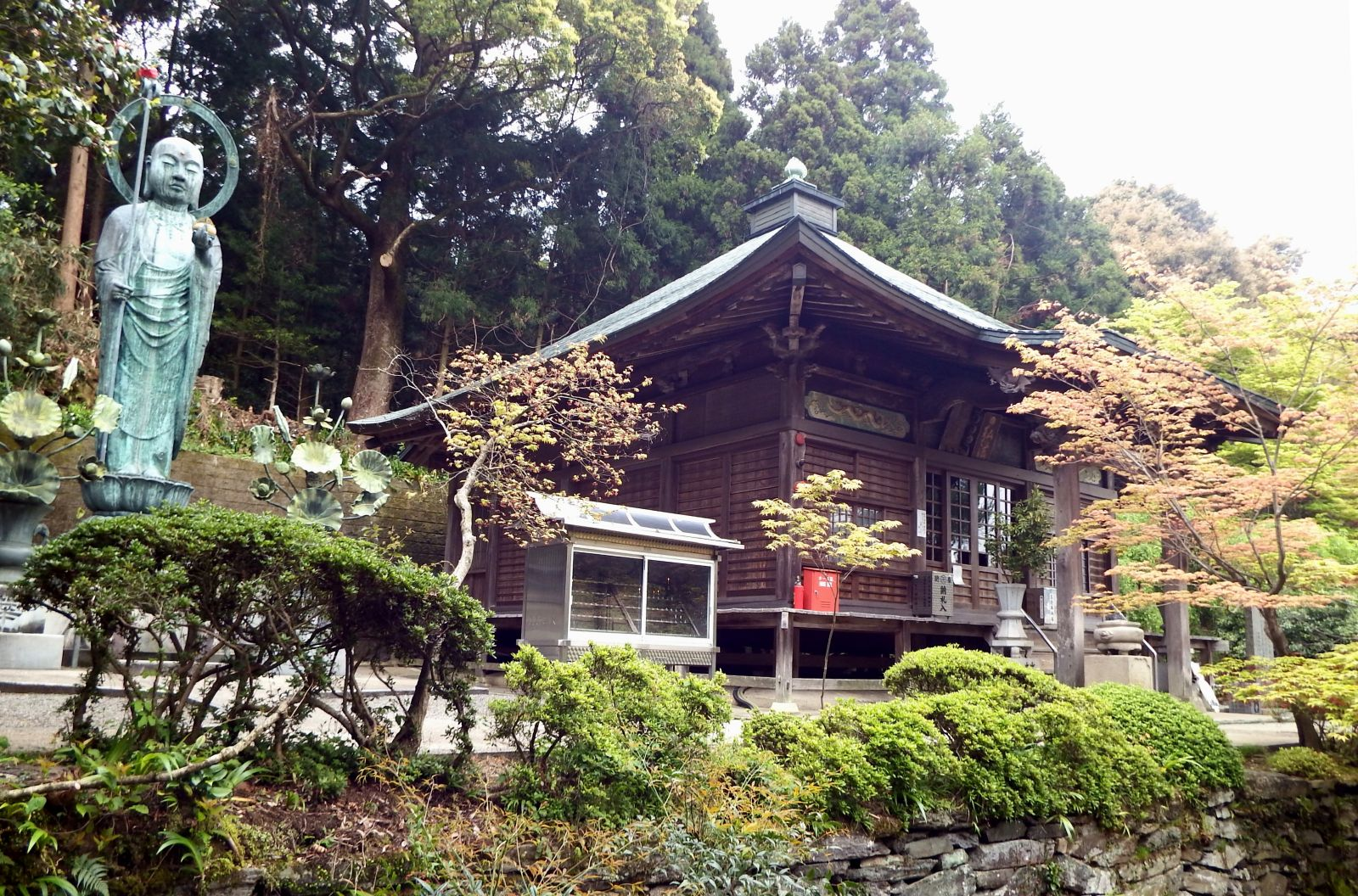 三角寺の大師堂